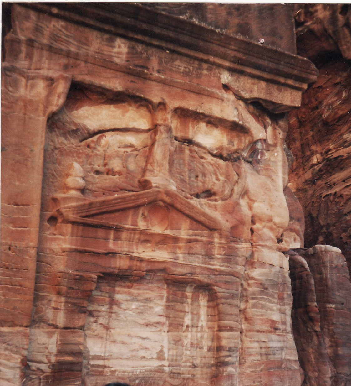 אלחזנה בפטרה, פרט